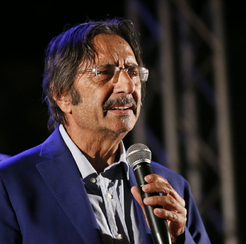 Enzo Colacino durante uno spettacolo nel 2017